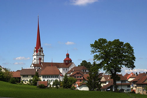 Stift St. Michael in Beromünster (Nr. 03.1-5673)